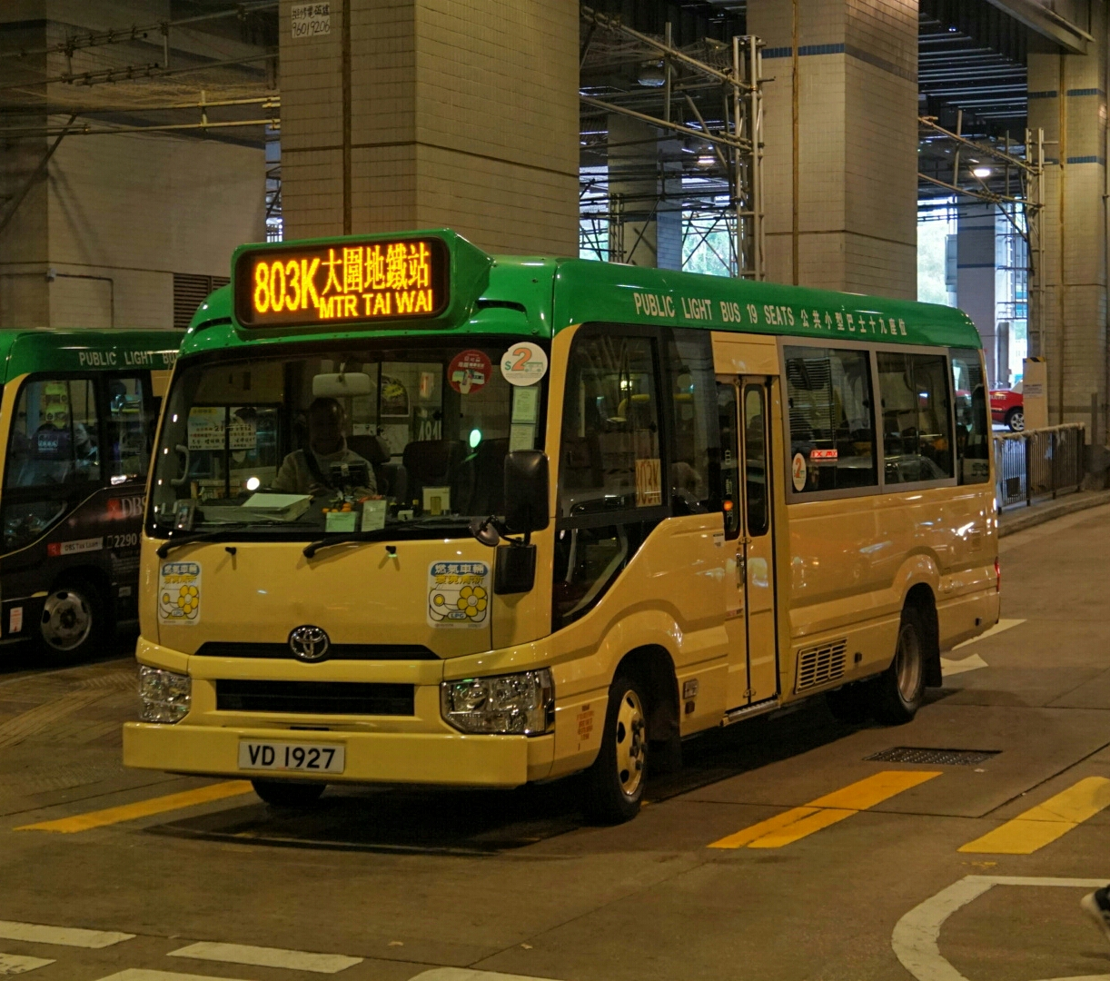 中文（香港）: 新界區專線小巴803K線，正在大圍站等待開出